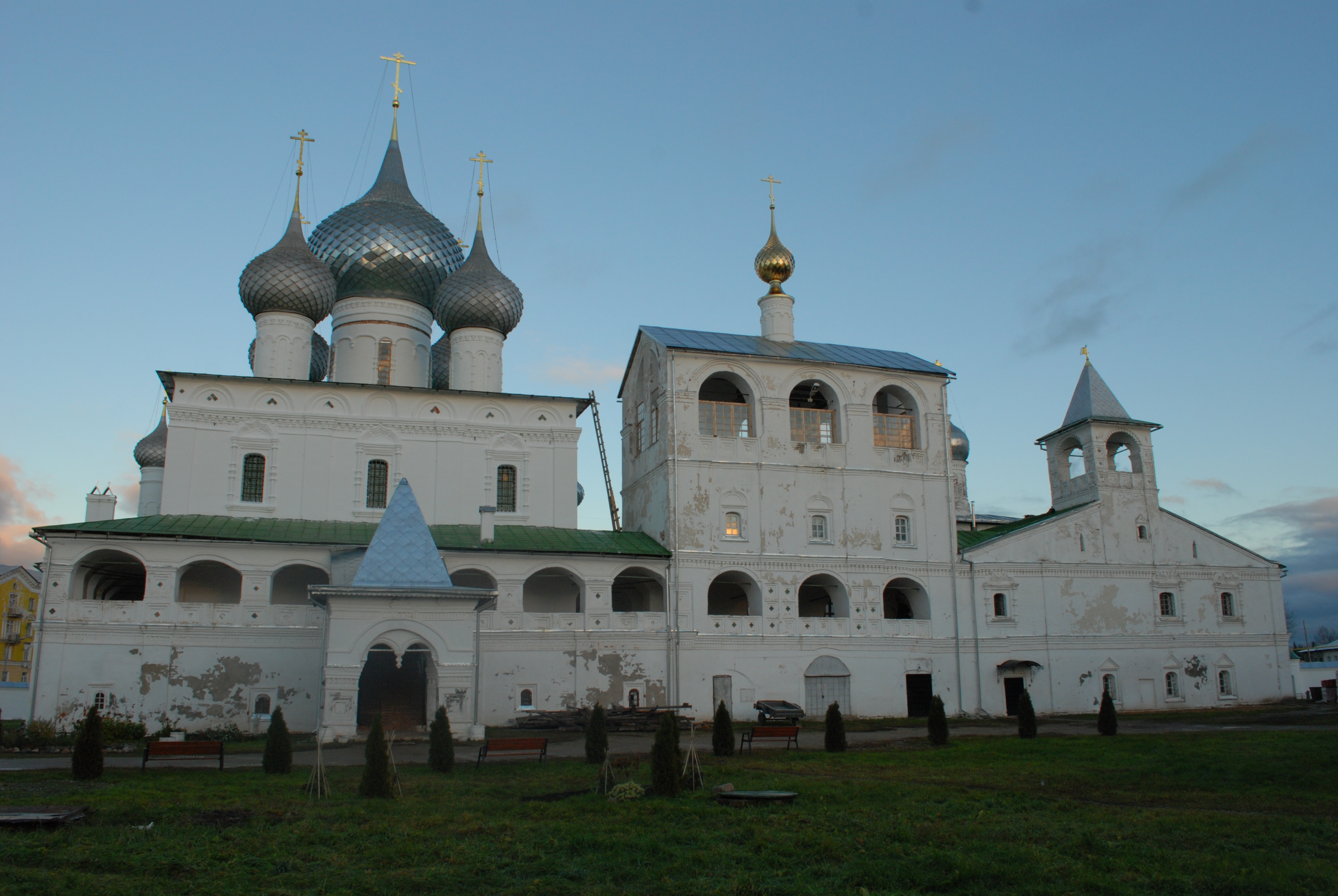 Ансамбль Воскресенского монастыря (Ярославская область, Углич, Советская площадь, 4)